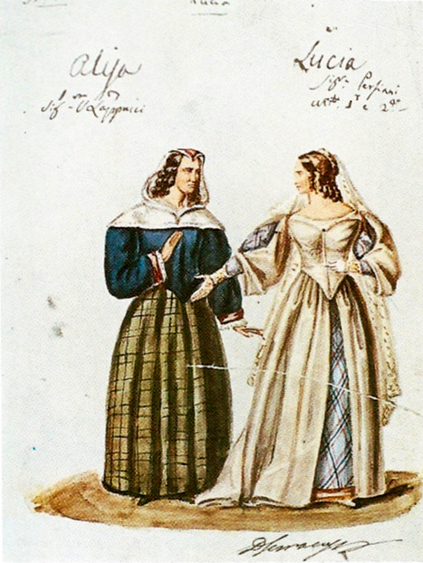 Figurino per i personaggi di Lucia e di Alisa nella Lucia di Lammermoor